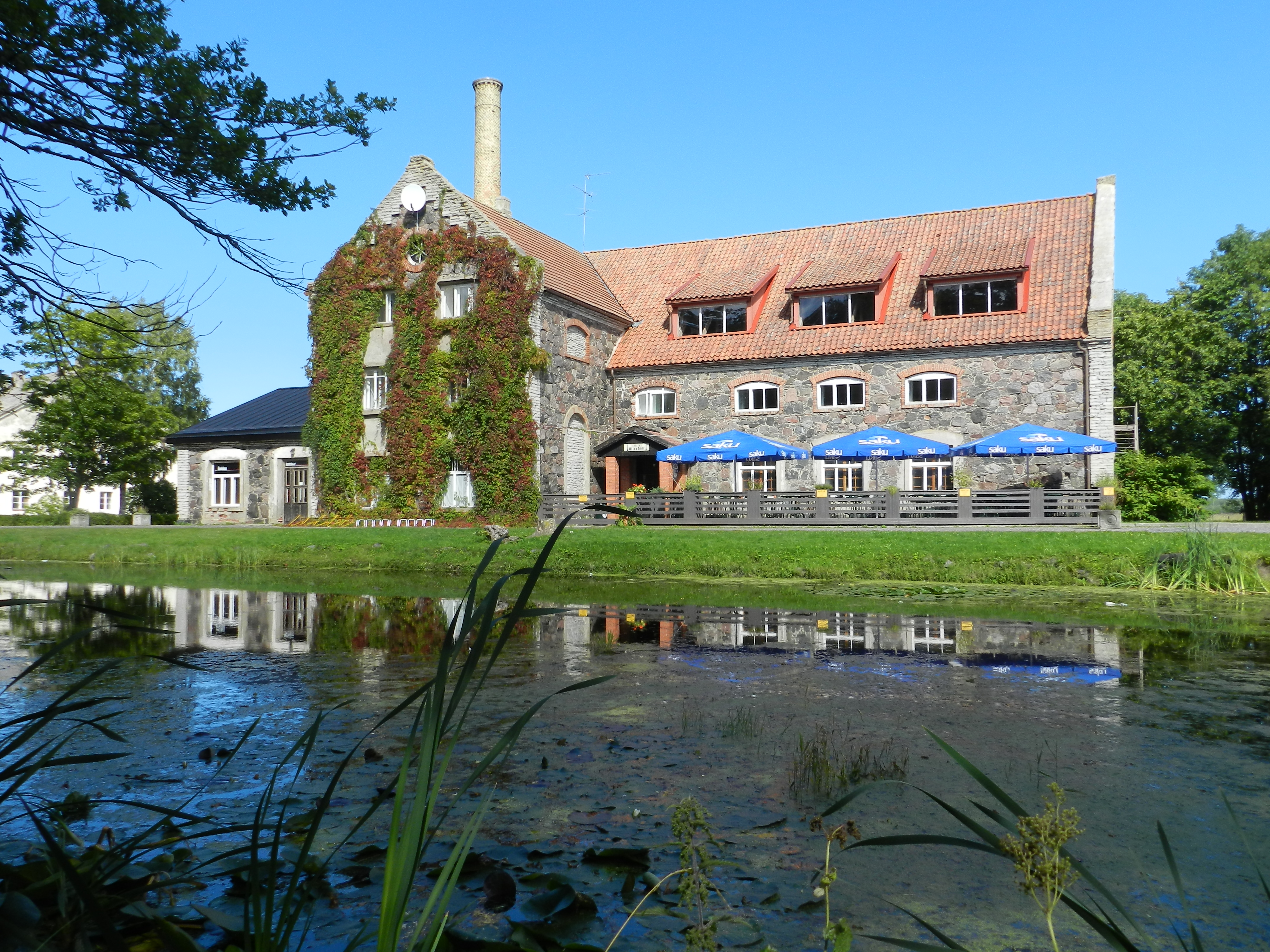 Kõrgessaare mõisa viinaköök, Hiiumaa